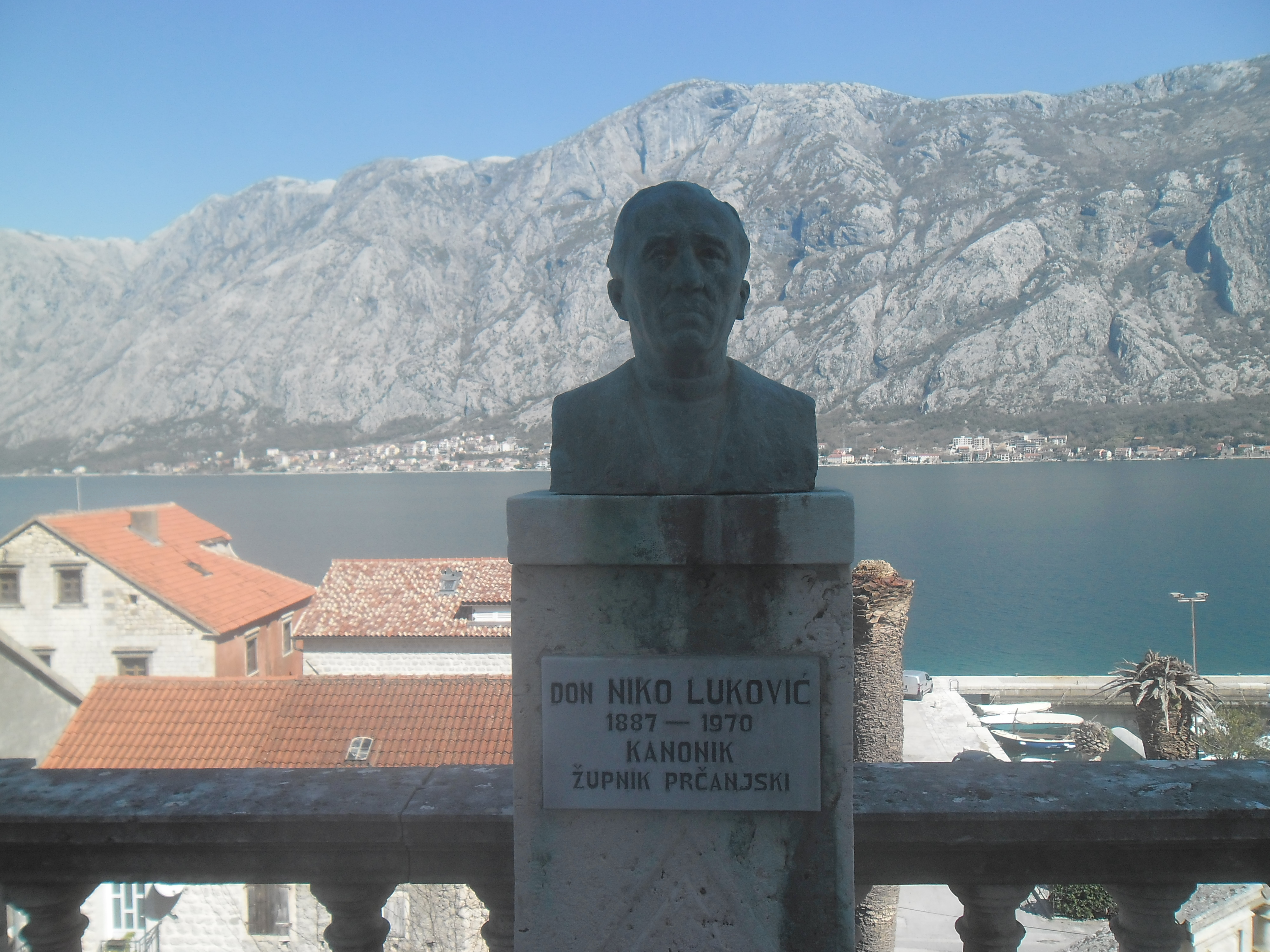 Prčanj